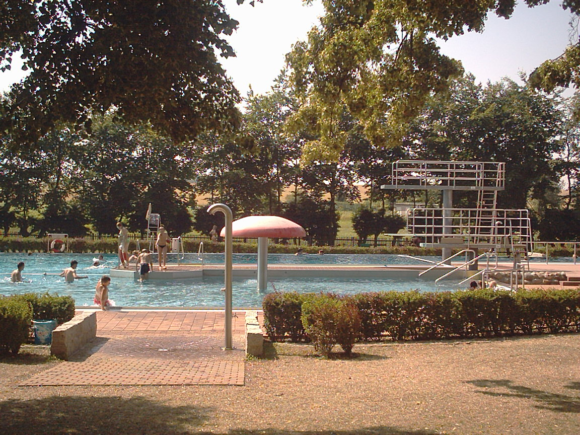 Summary Bildbeschreibung: Freibad Triptis Quelle: eigenes Foto Fotograf/Zeichner: Christian Bier Datum: 2006 Sonstiges: ...